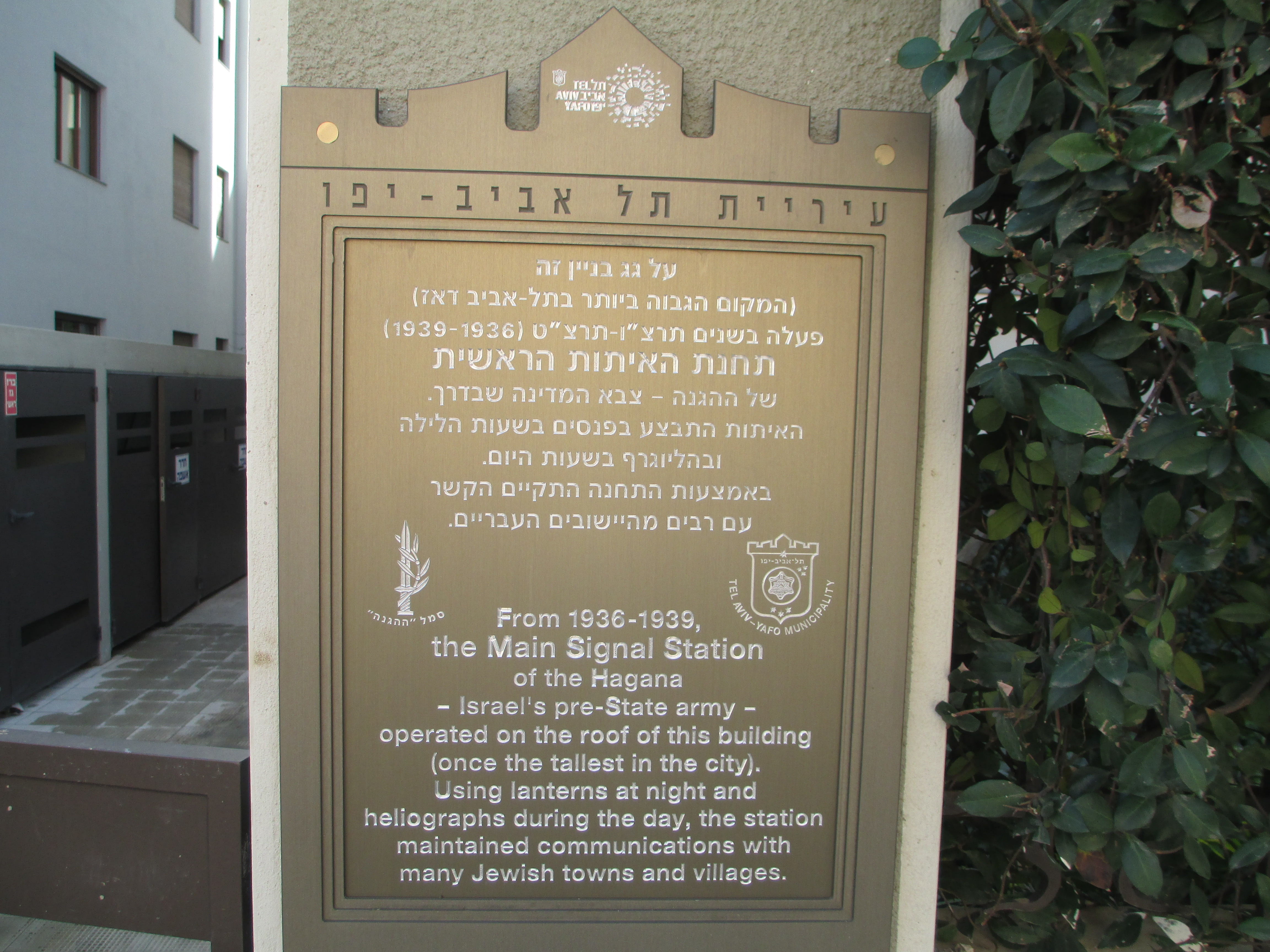 לוחית זיכרון במקום בו הייתה תחנת האיתות הראשית בתל אביב, ברחוב אחד העם 84